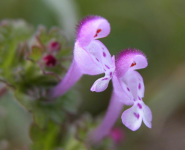 Stängelumfassende Taubnessel (Lamium amplexicaule), aufgenommen am Waldrand in der Nähe von Oppenrod